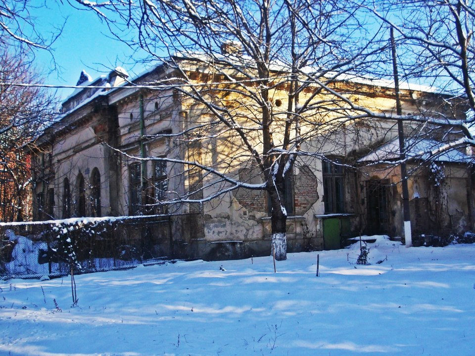 Sinagoga Cismarilor este un fost lăcaș de cult evreiesc.